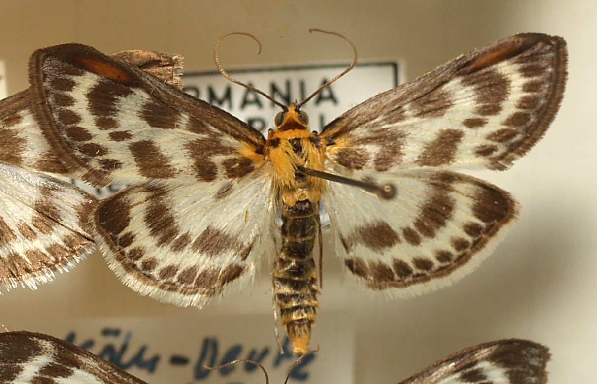 Eurrhypara hortulata